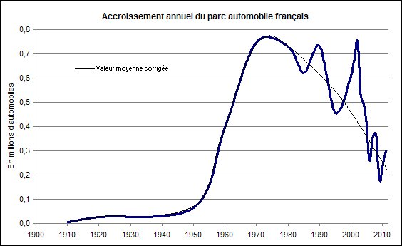 Description Graphique de l'accroissement annuel du parc automobile français de 1900 à 2011 Date19 February 2012SourceOwn workAuthorBrucesatto Graphique de l'accroissement annuel du parc automobile français de 1900 à 2011